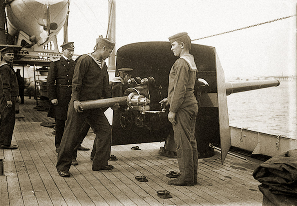 Экипаж болгарского крейсера Надежда, 1900-е гг.